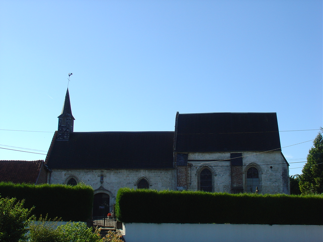 Église de Framecourt